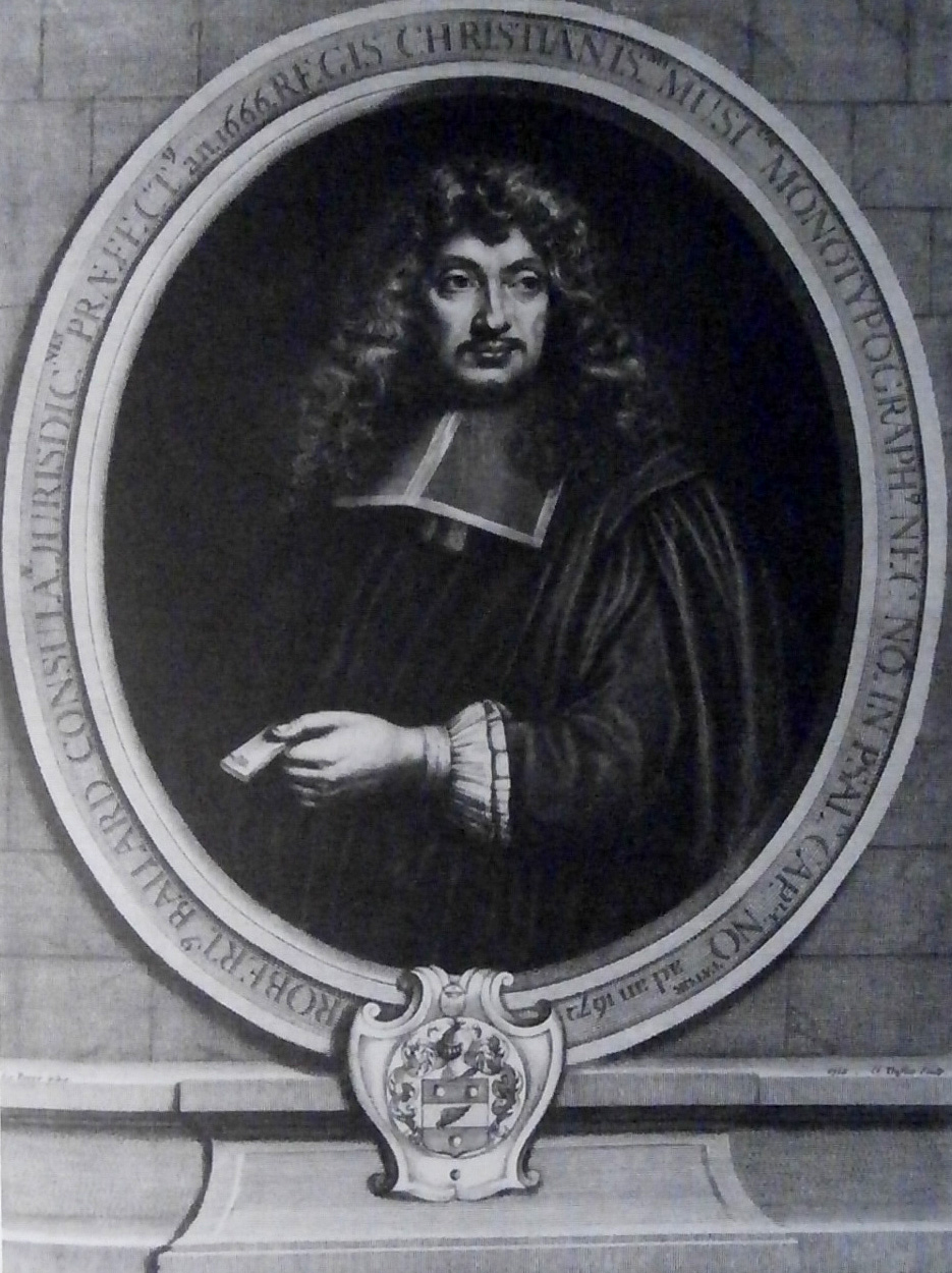 Robert III Ballard, imprimeur de musique parisien